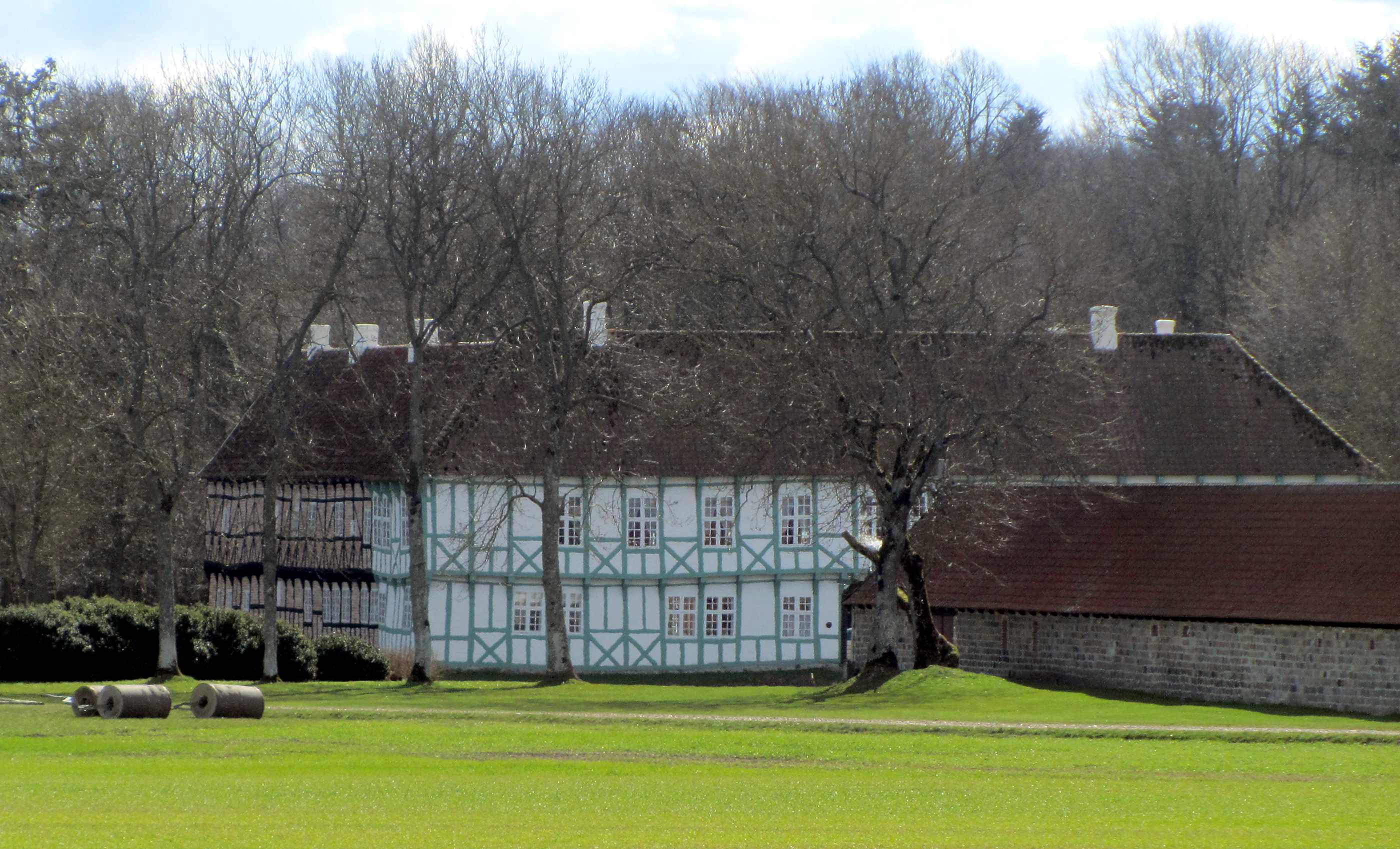 Lynderupgaard set fra nord